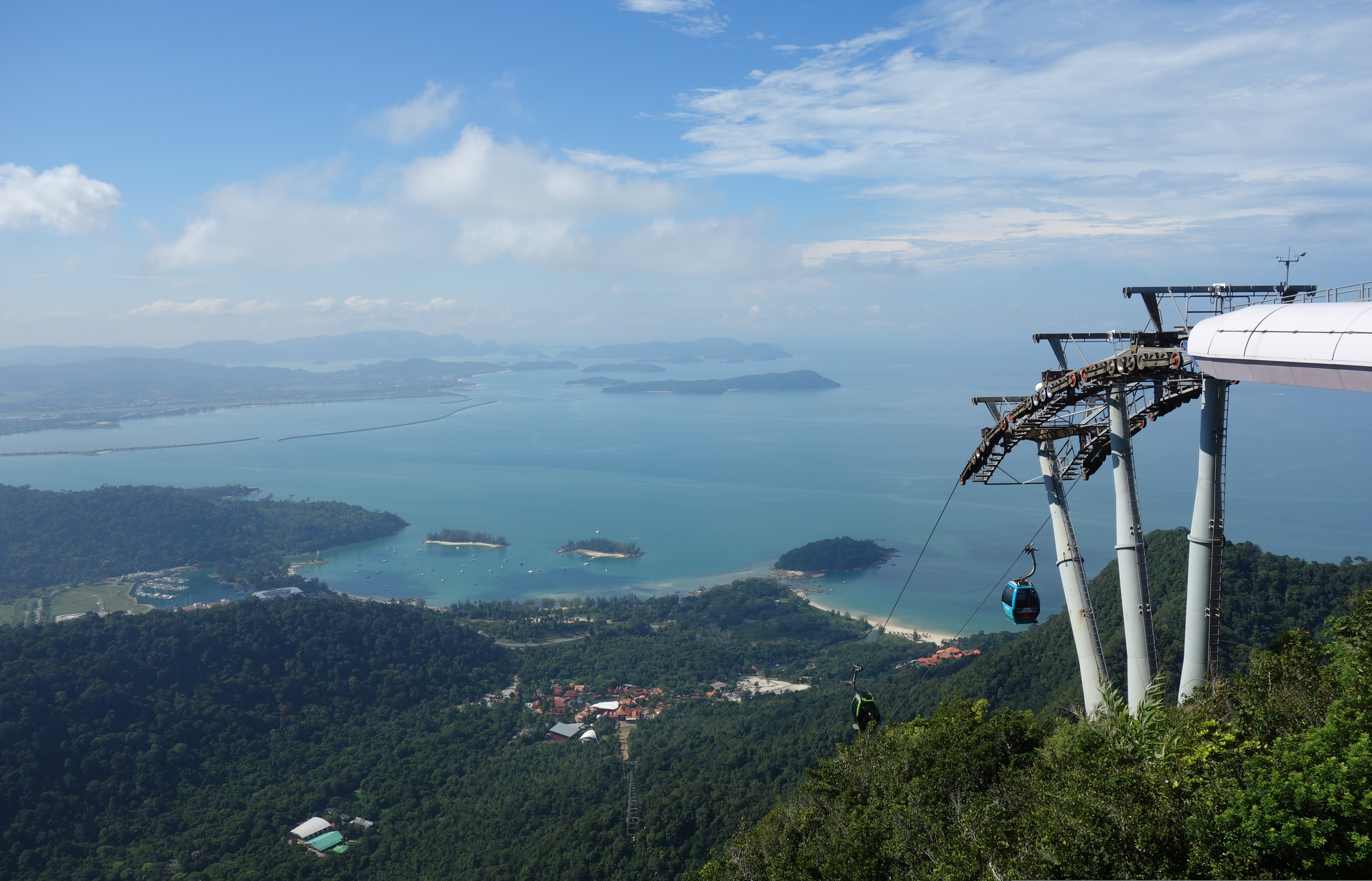 Langkawi Cable Car SKYCAB